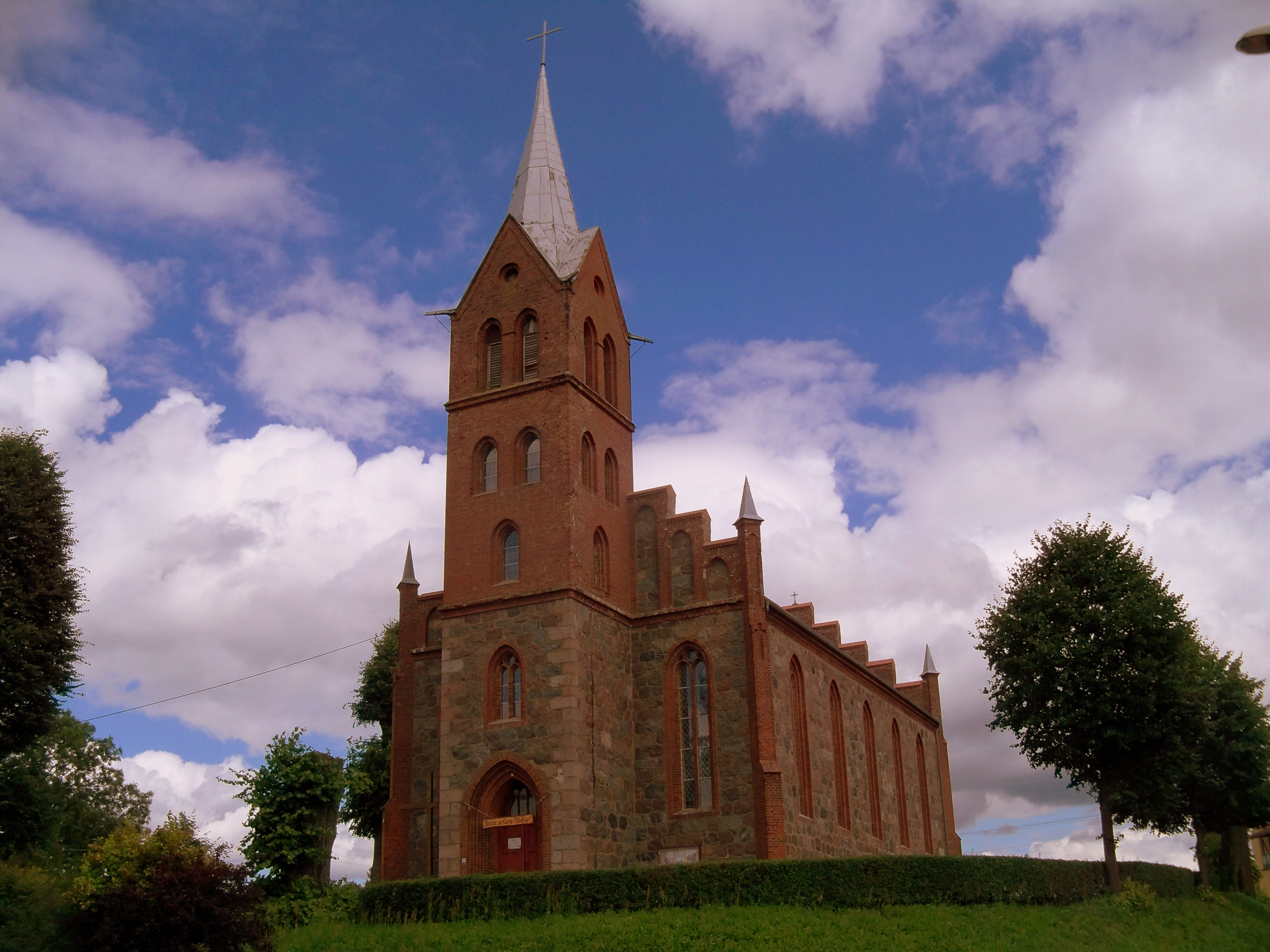 Kościół parafialny p.w. MB Różańcowej w Popielewie, gmina Połczyn Zdrój